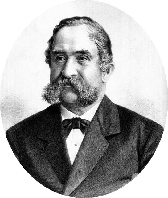 Josef Riedel (1816 - 1894), Český sklářský průmyslník německé národnosti.